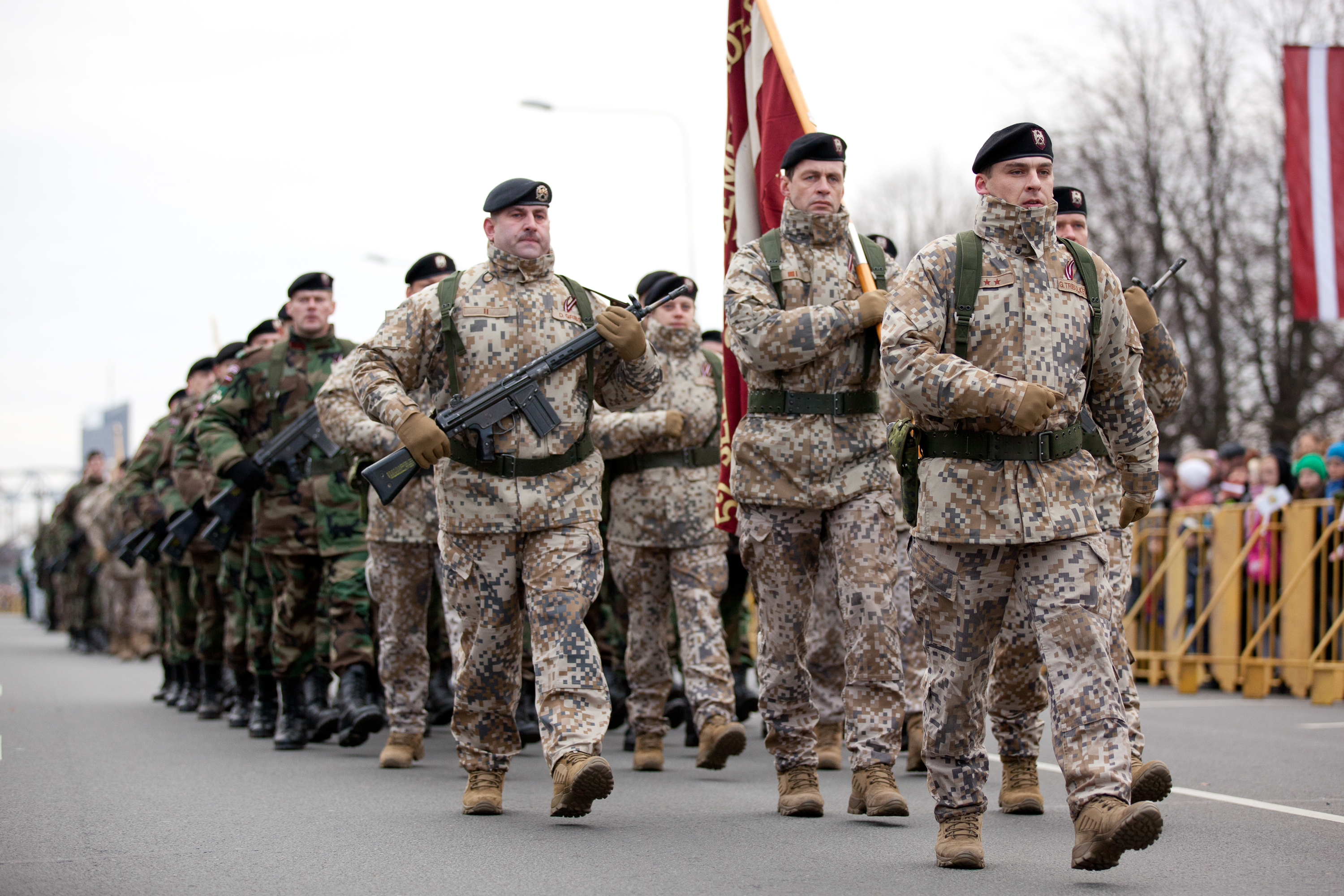 Foto: Toms Norde, Valsts kanceleja